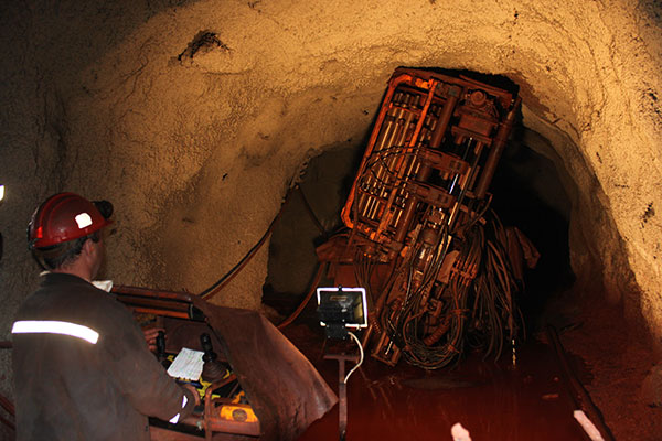 Производственный процесс